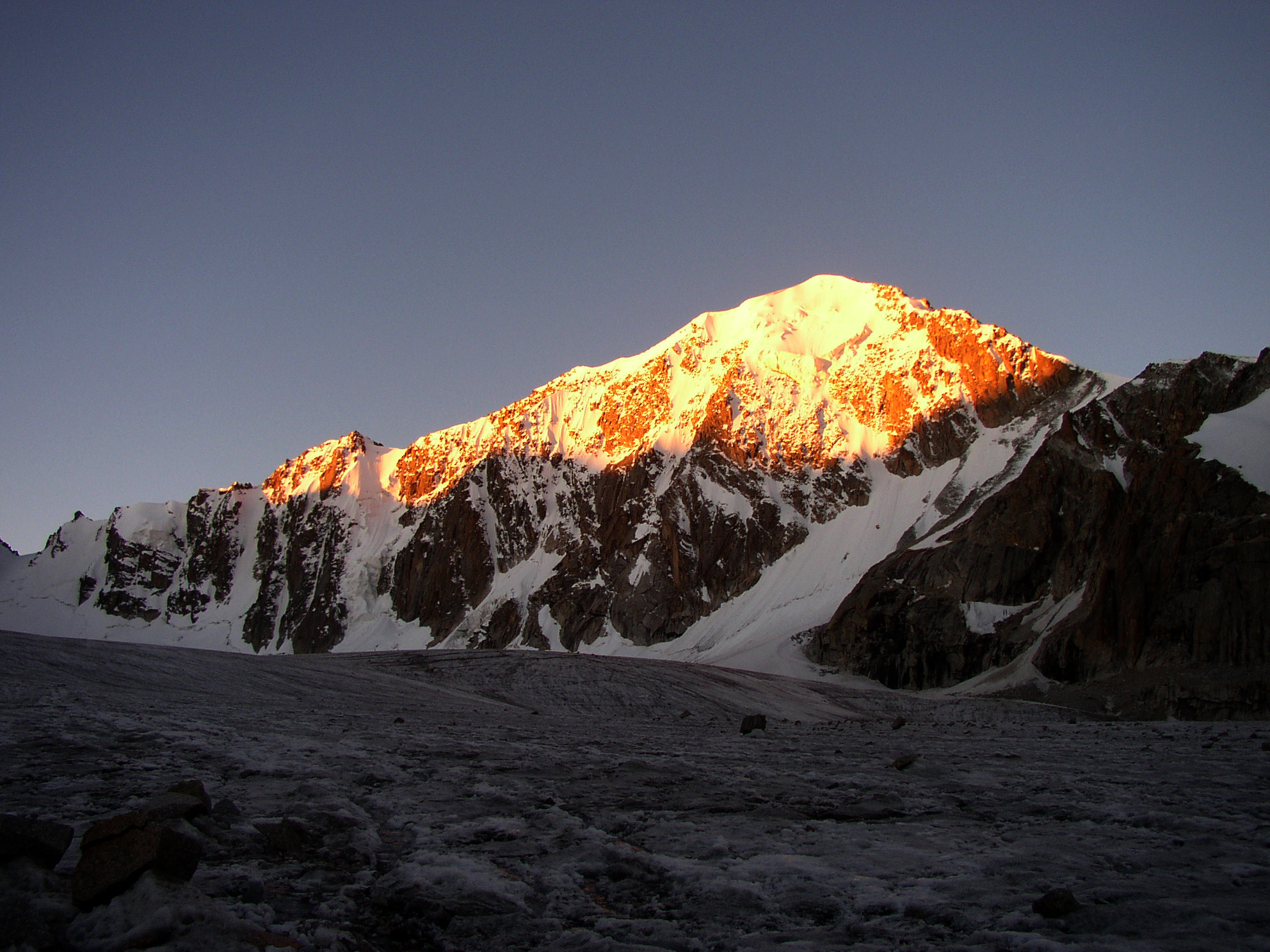 Рассвет в горах Джунгарии